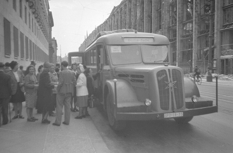 Original image description from the Deutsche Fotothek(Weissensee-Bismarckstr., Hohenstaufen- und Klingsohrstr.) Henschel Linienbus Berlin-Halle, 1946